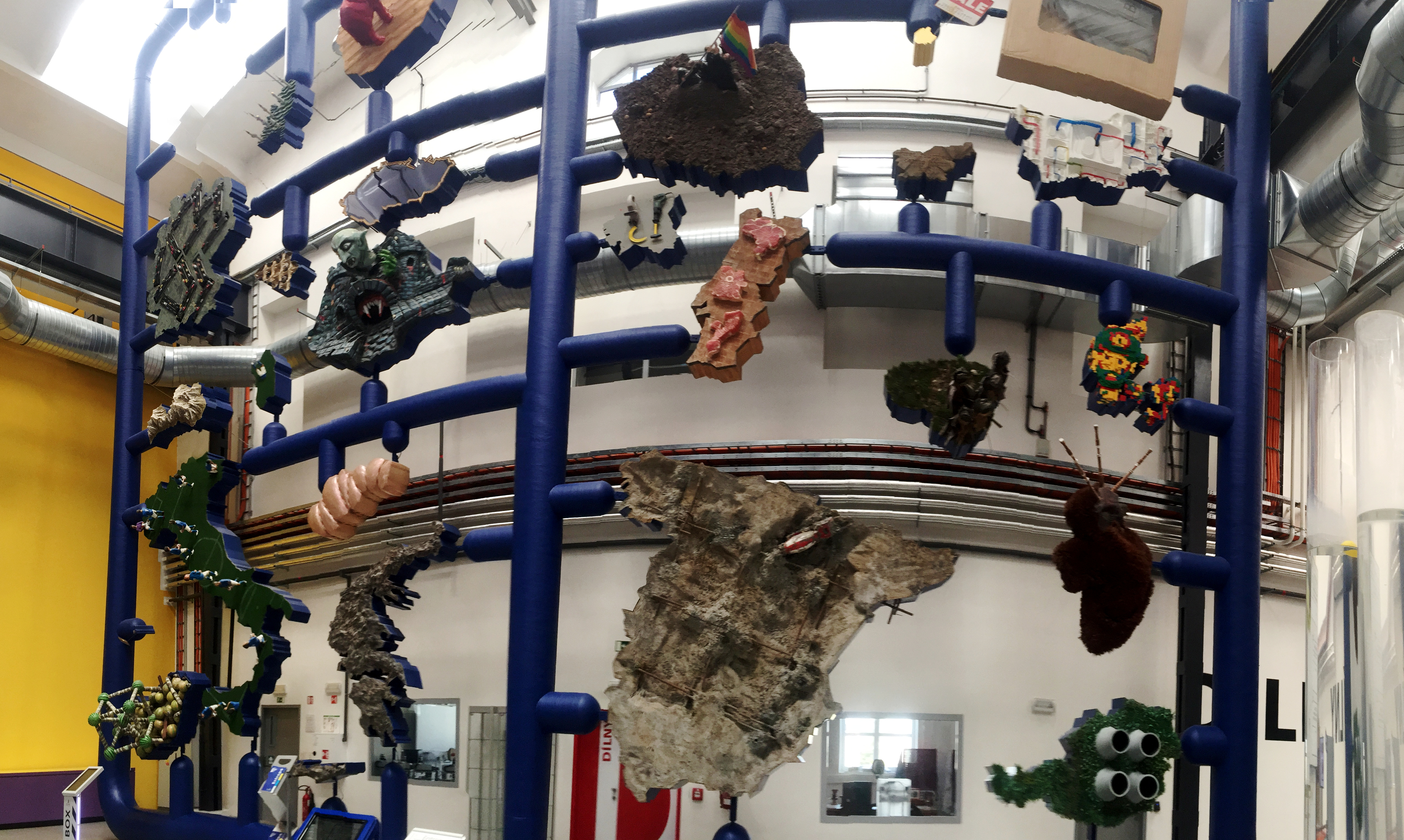 Foto Entropy v expozici Budoucnost na talíři